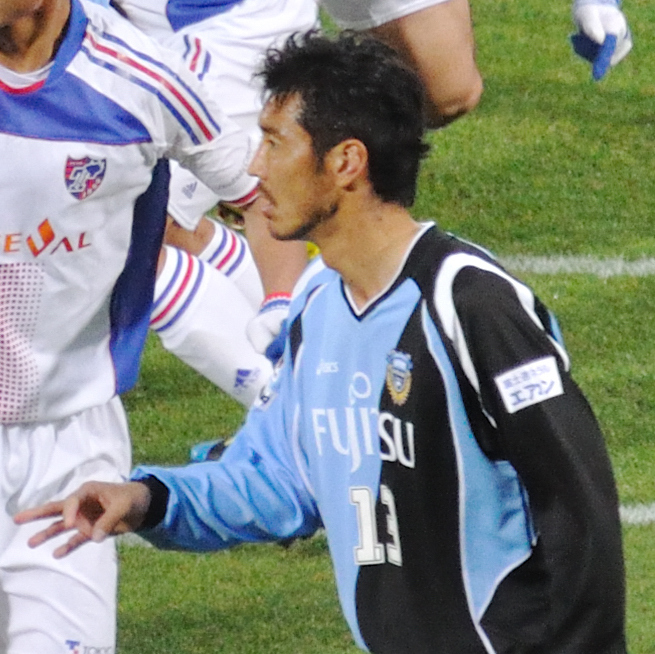 Kawasaki Frontale vs FC Tokyo